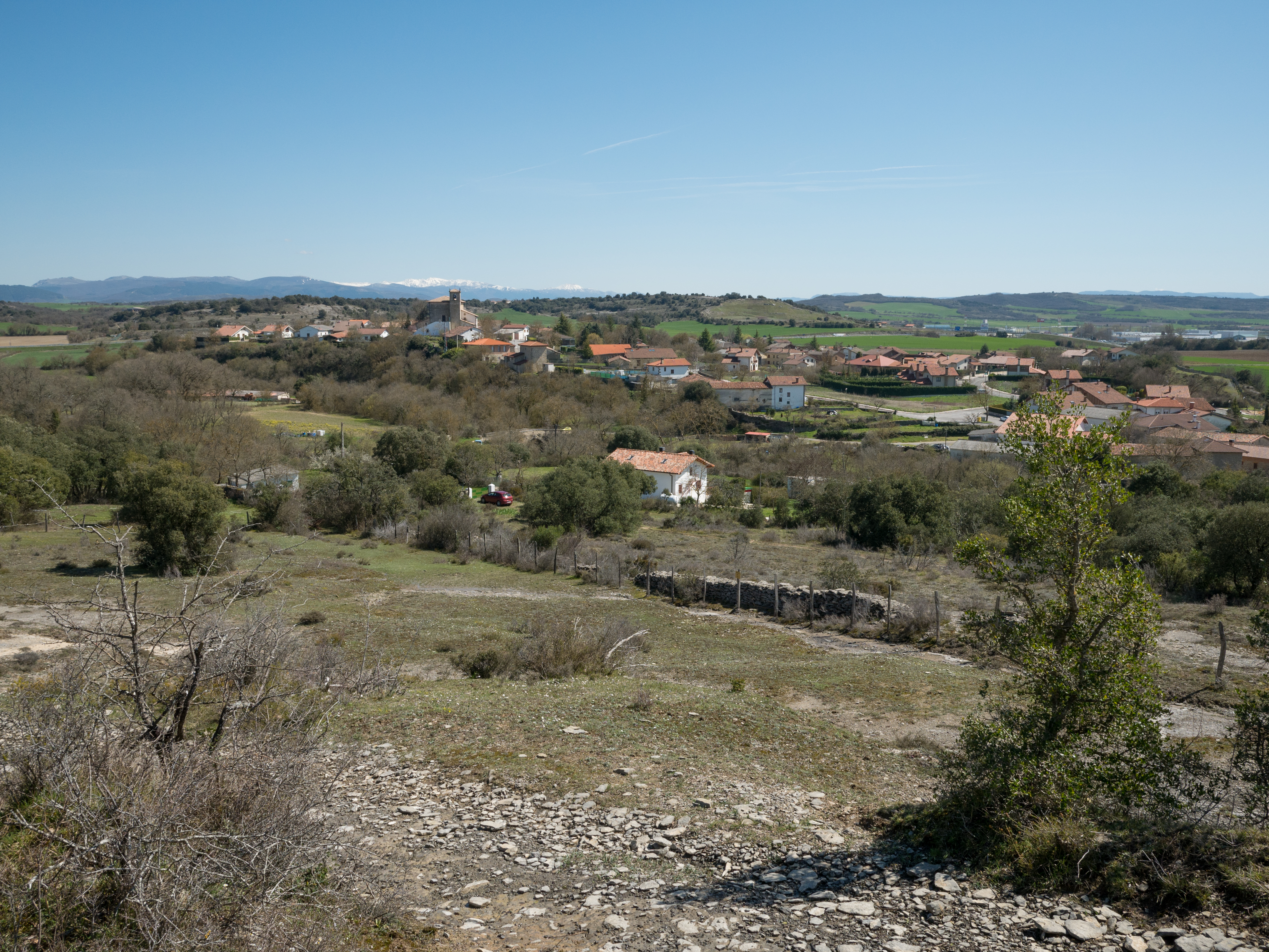 Apodaka. Zigoitia, Álava, País Vasco, España